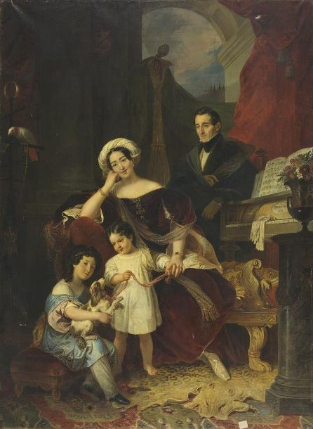 Семейный портрет Лазаревых. Христофор Екимович Лазарев с женой Екатериной Эммануиловной и детьми.